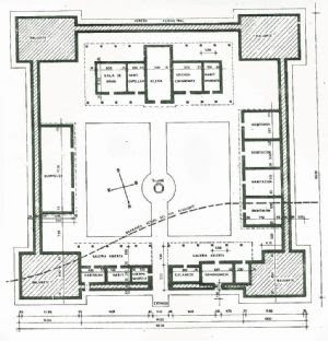 No es mio el trabajo, pero aquí debe haber mínimo el plano del fortín.